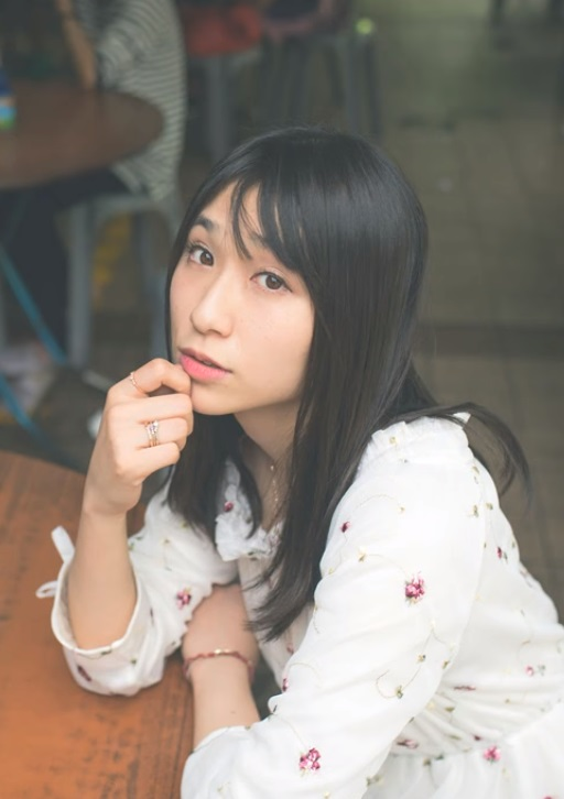 小見川千明（自身のYouTubeチャンネル投稿動画（クリエイティブ・コモンズ表示ライセンス（再利用を許可する）を示しているもの）より）